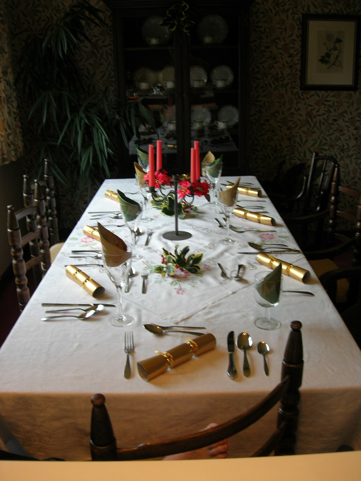 Boxing day dinner table